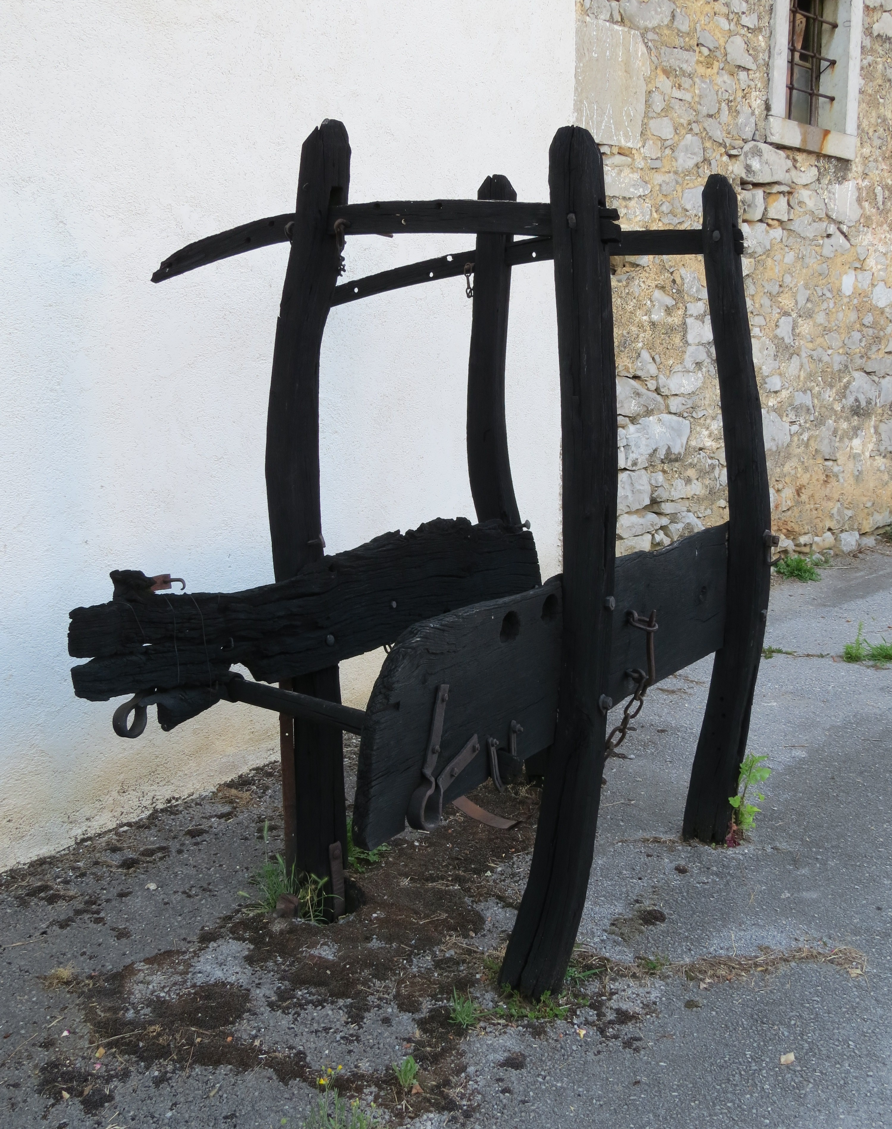 Sredi vasi Stomaž stoji ened od redkih še ohranjenih štantov, v katerem so podkovali vole.